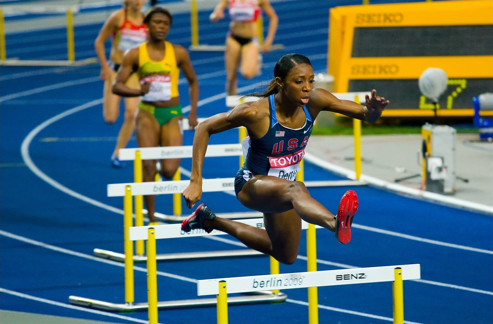 Lashinda Demus - 2.Platz über 400m Hürden (hier im Semifinale)